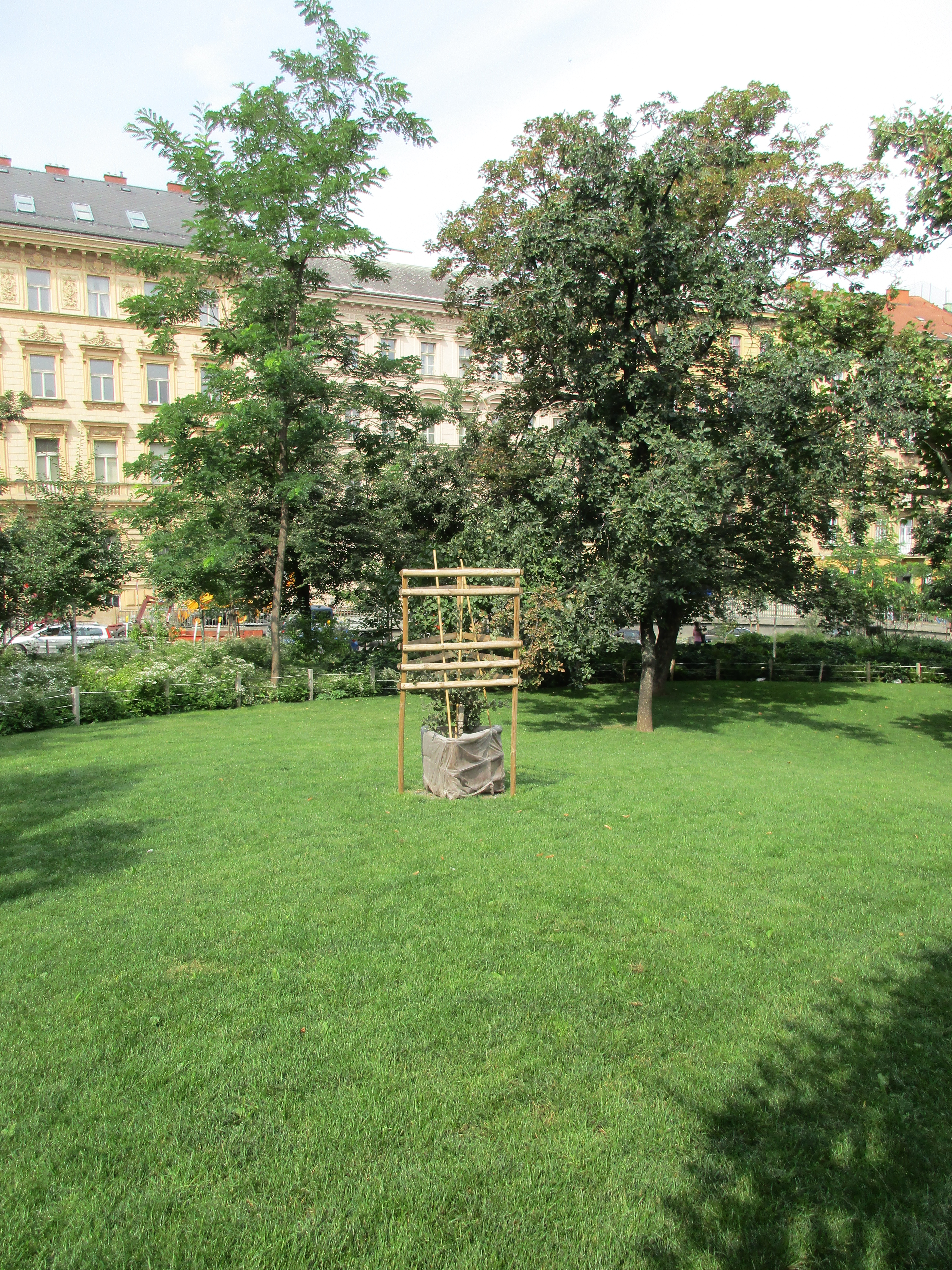 Dub taborský (Quercus macrolepis). Praha 1-Nové Město, Čelakovského sady. Vysazen roku 2018 na památku 100. výročí vzniku Československé republiky.